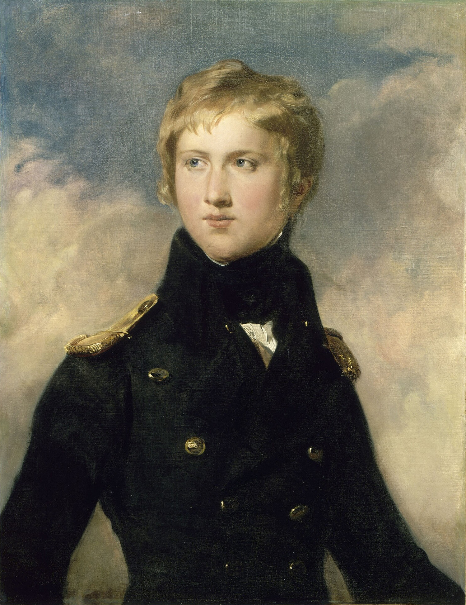 En uniforme de lieutenant-colonel, adjudant-général en 1792